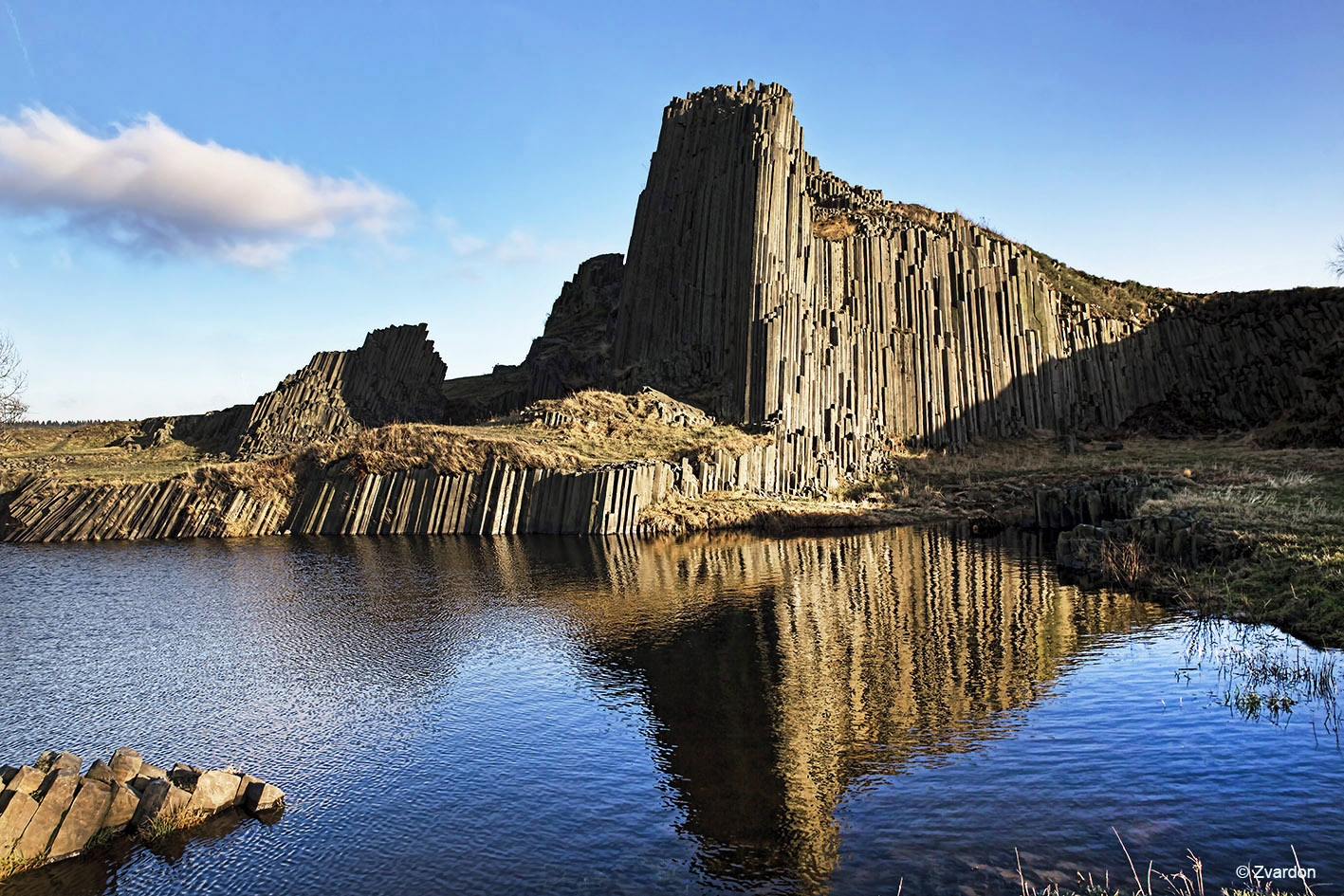 Panska skala( Rocher basalt ) République Tchèque